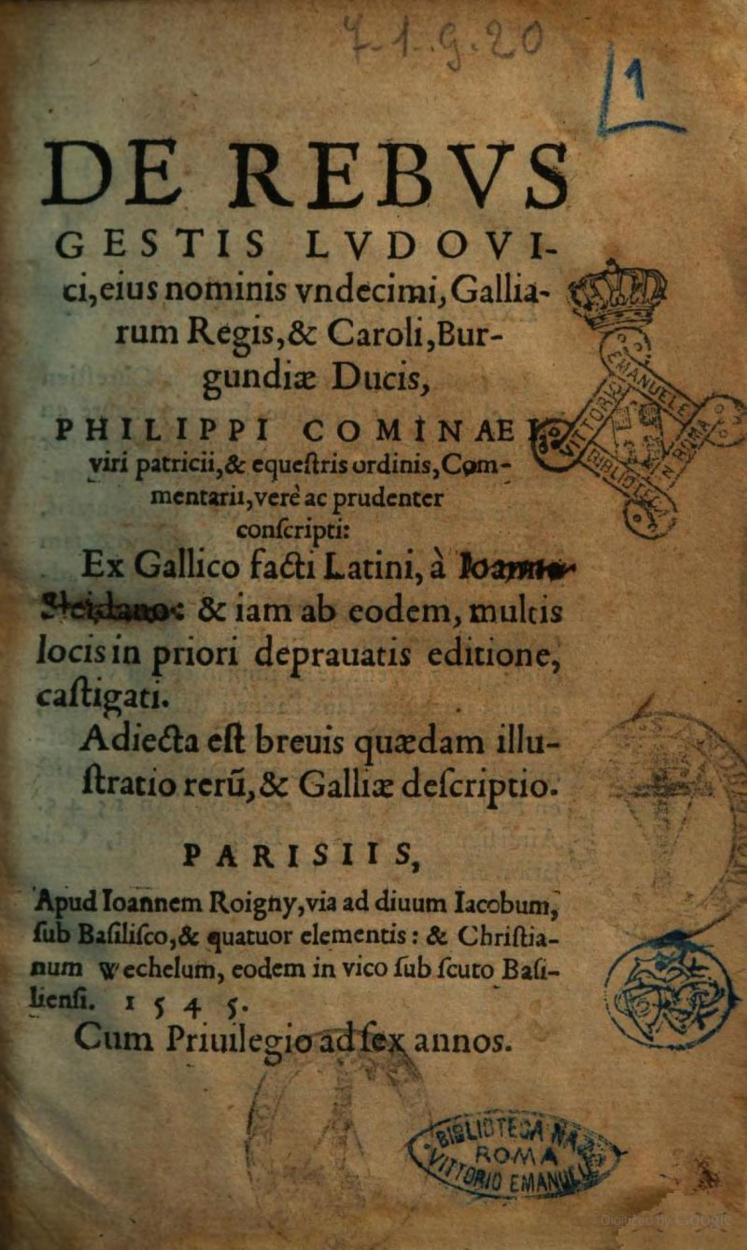 Philippus Cominaeus, De rebus gestis Ludovici XI, 1545, tutle page